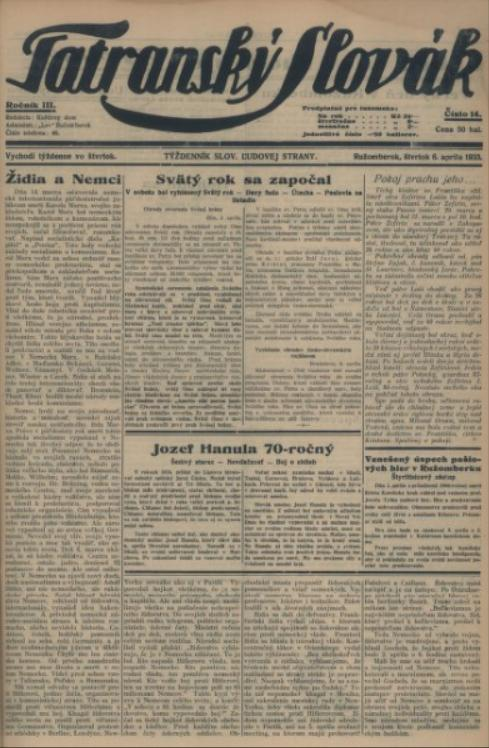 Titulný list týždenníka Tatranský Slovák.